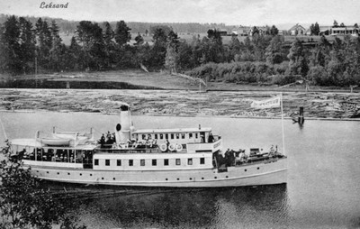 S/S Gustaf Wasa in Leksand, Sweden